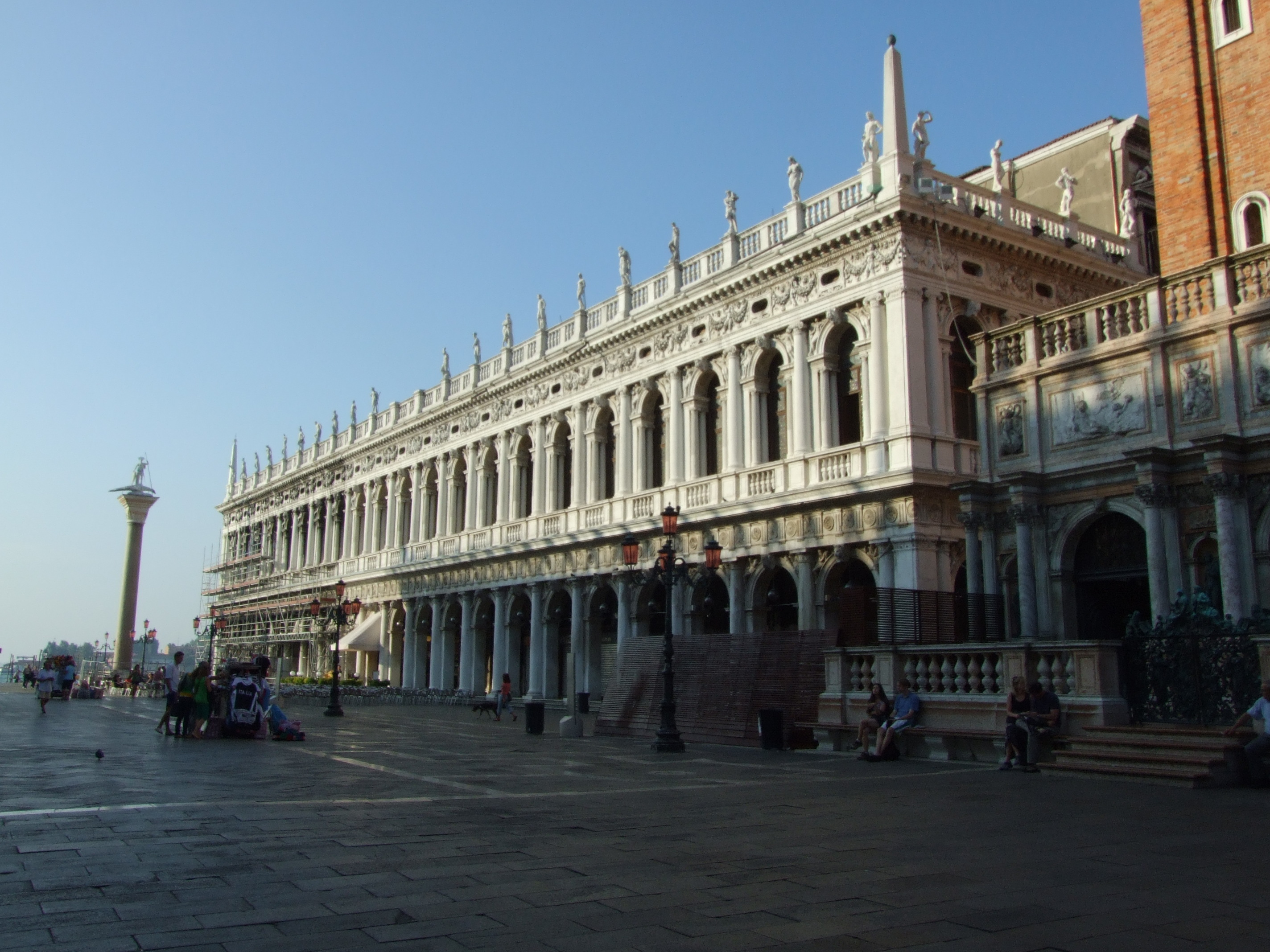 Piazza San Marco, per la mattina.